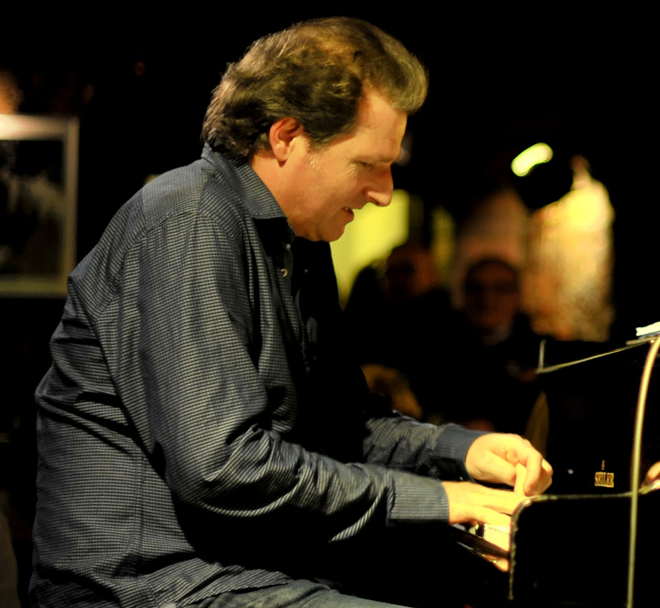 Johannes Mössinger am 09.11.2013 im Jazzkeller Frankfurt